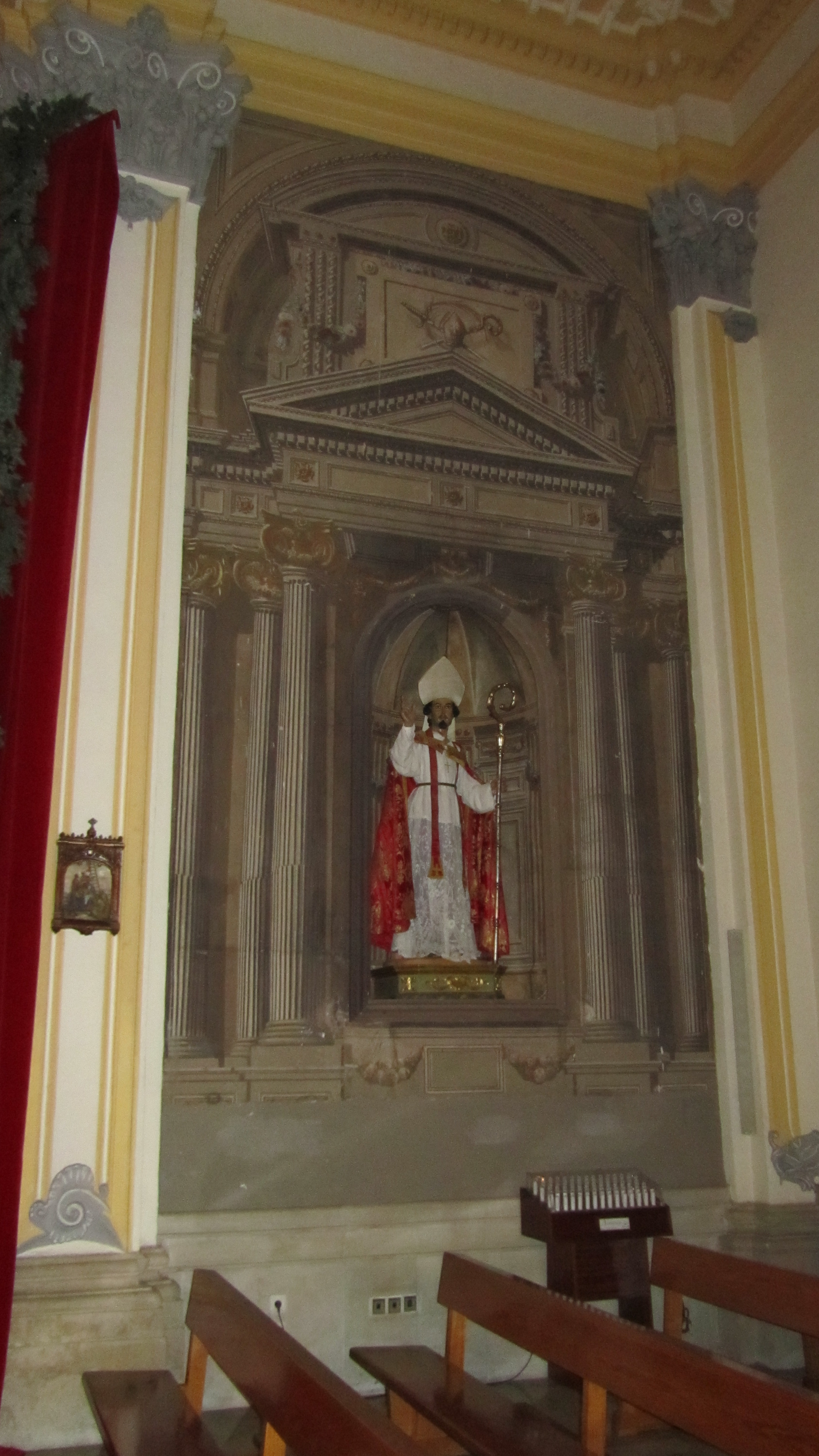 Retablo pictórico de la Iglesia de Santa Eulalia en Murcia (España)